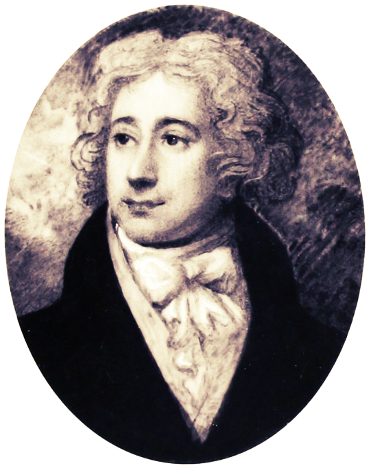 Gould Francis Leckie, proprietario terriero in Sicilia nel 1800 (fino al 1807)